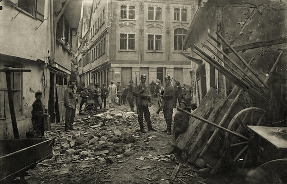 Württembergisches_Infanterie-Regiment_Nr.180_-Blick aus der Tübinger Froschgasse in die Hirschgasse nach Schäden durch eine Fliegerbombe am 12. Oktober 1916